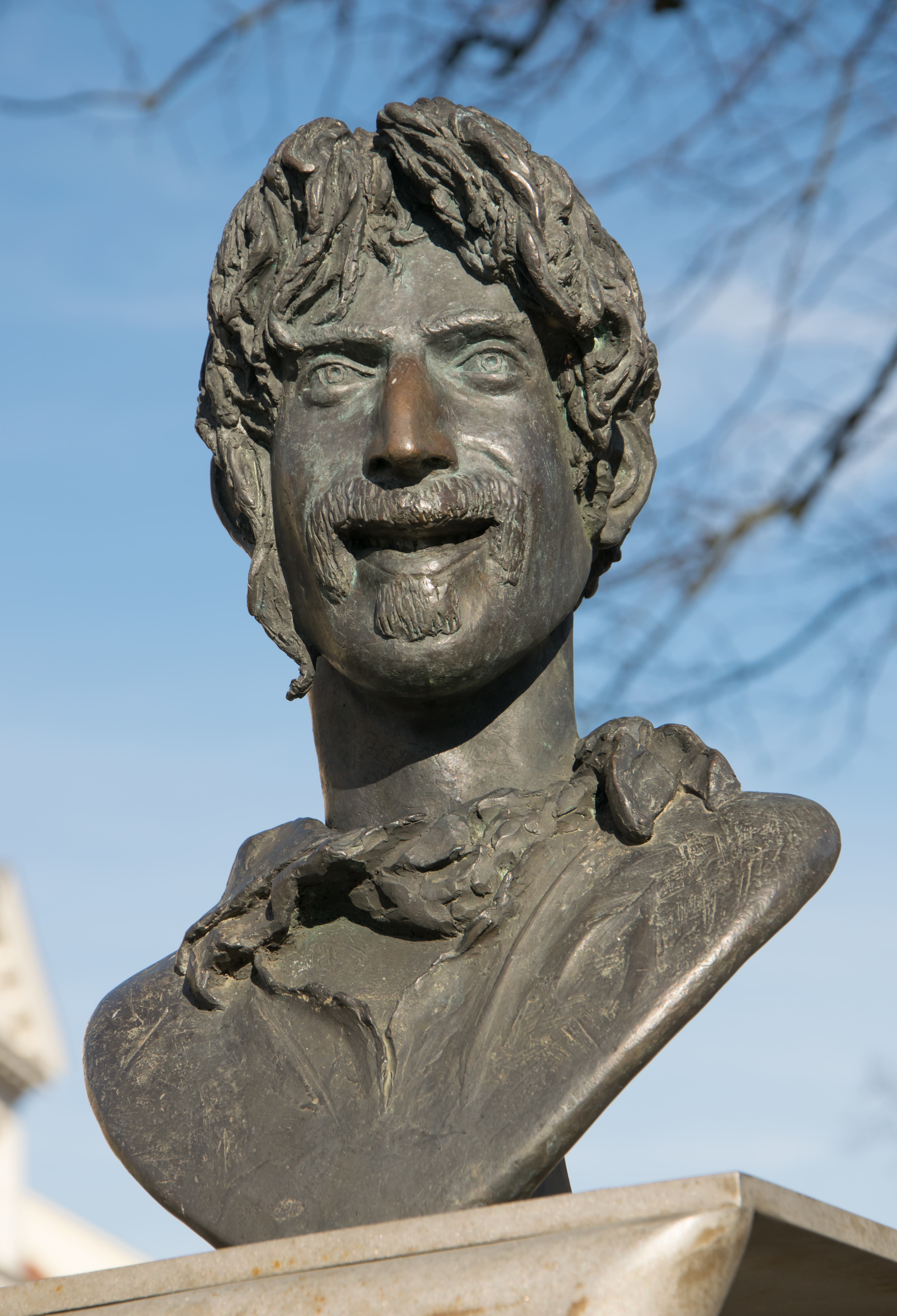 Doberan Zappa-Denkmal